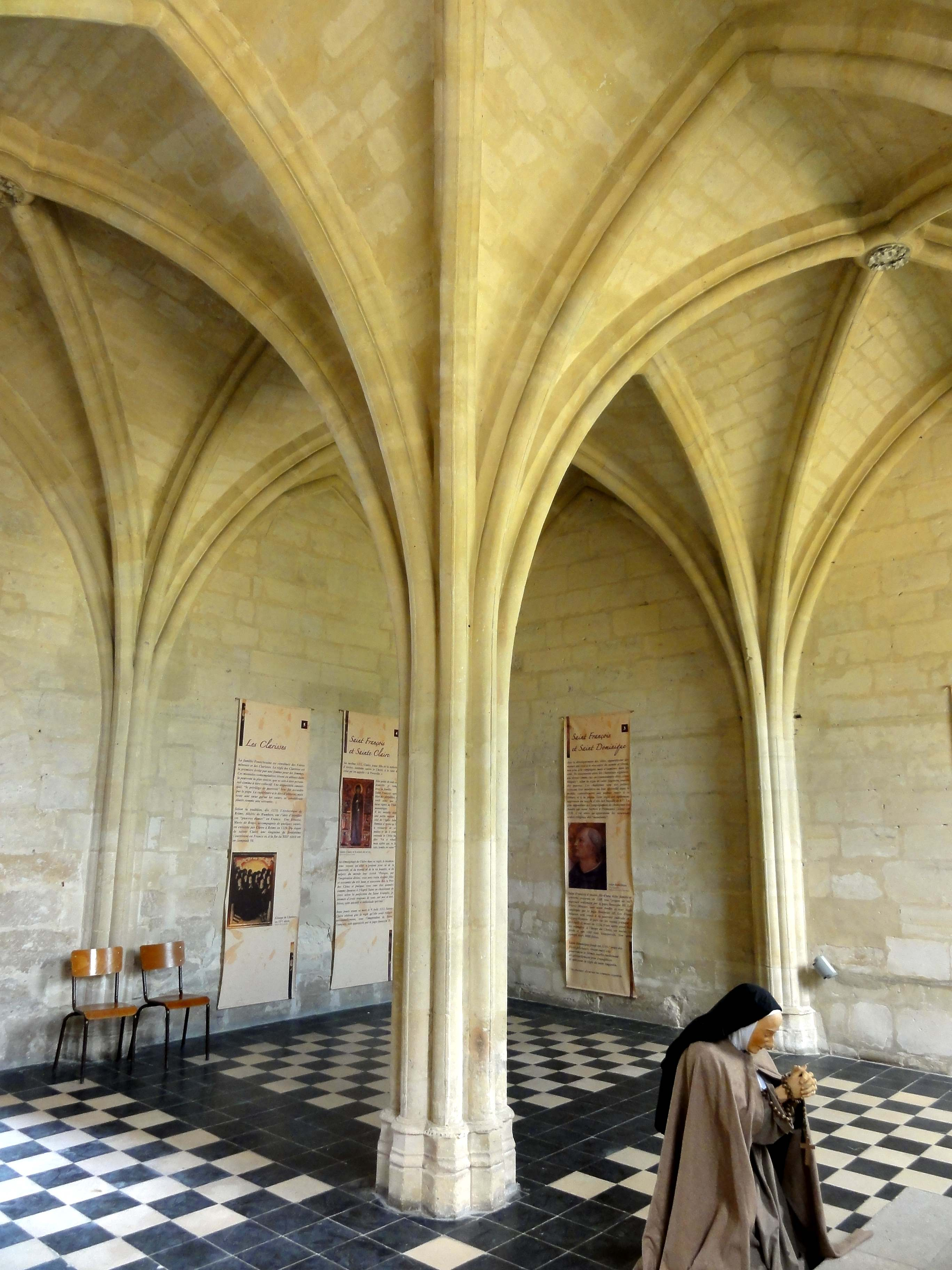 Intérieur de l'abbaye - voir titre.